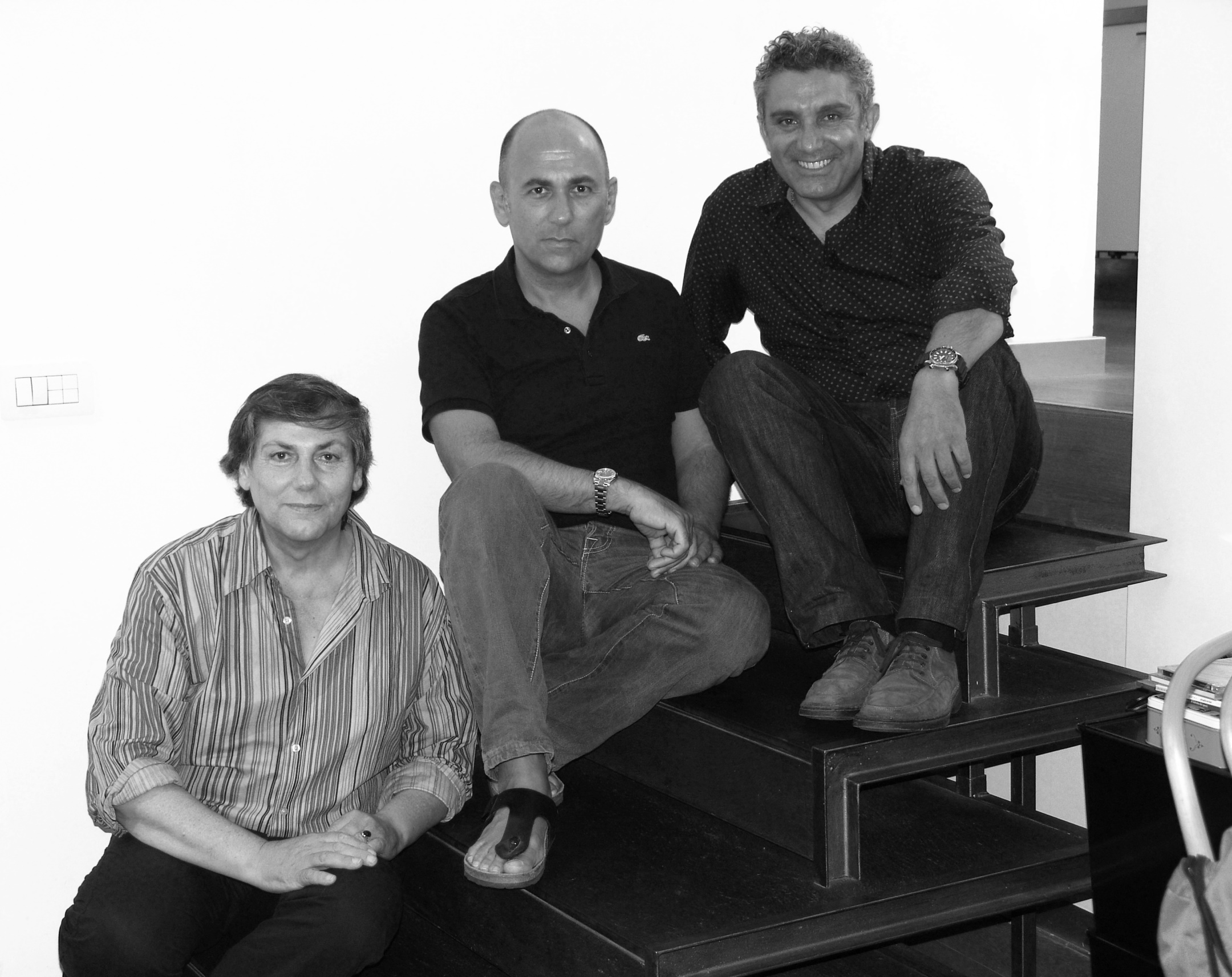 Italo Benedetti e Maugeri a casa di Ferzan Ozpetek - Roma 2010